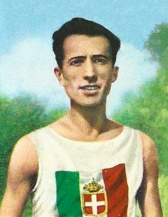 Valerio Arri